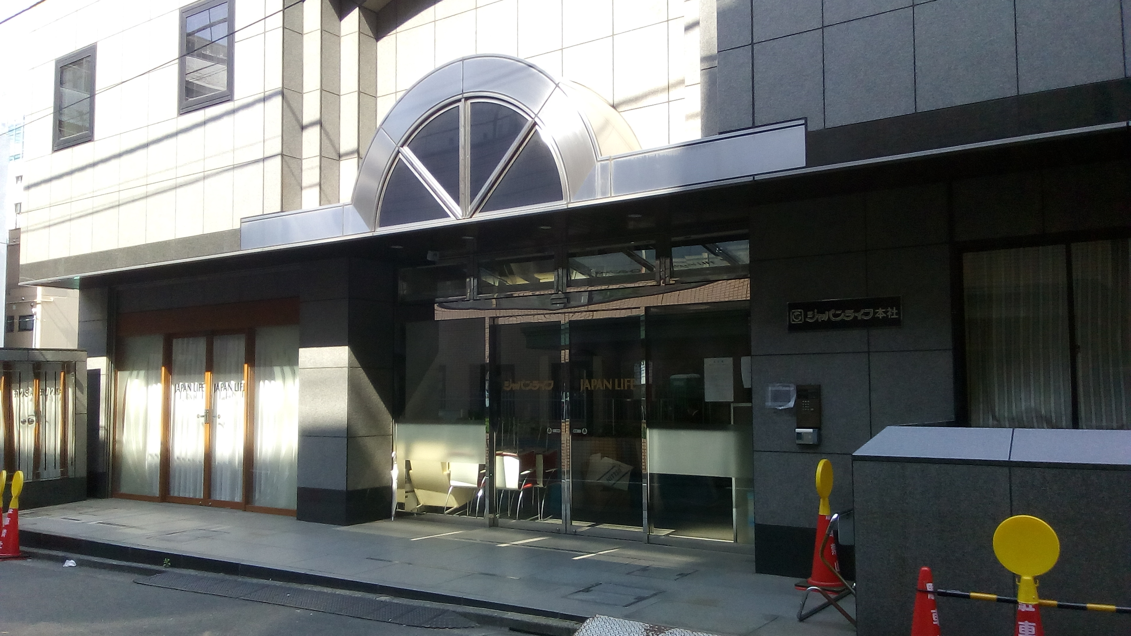 破産手続中のジャパンライフ本社（1）。2018年4月。 東京都千代田区西神田2丁目8番5号ジャパンライフビル。